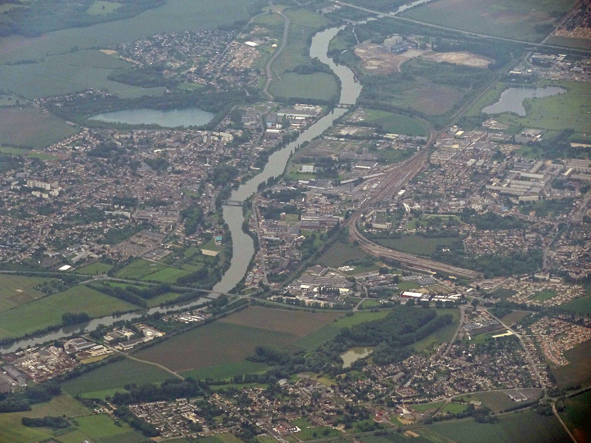 Vue aérienne de Persan, Beaumont-sur-Oise et Bernes-sur-Oise (Val-d'Oise), France. Vue en direction de l'ouest.